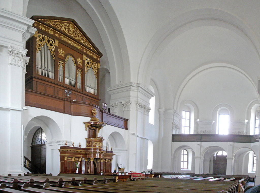 innenansicht der großen reformierten Kirche in Debrecen, Ungarn